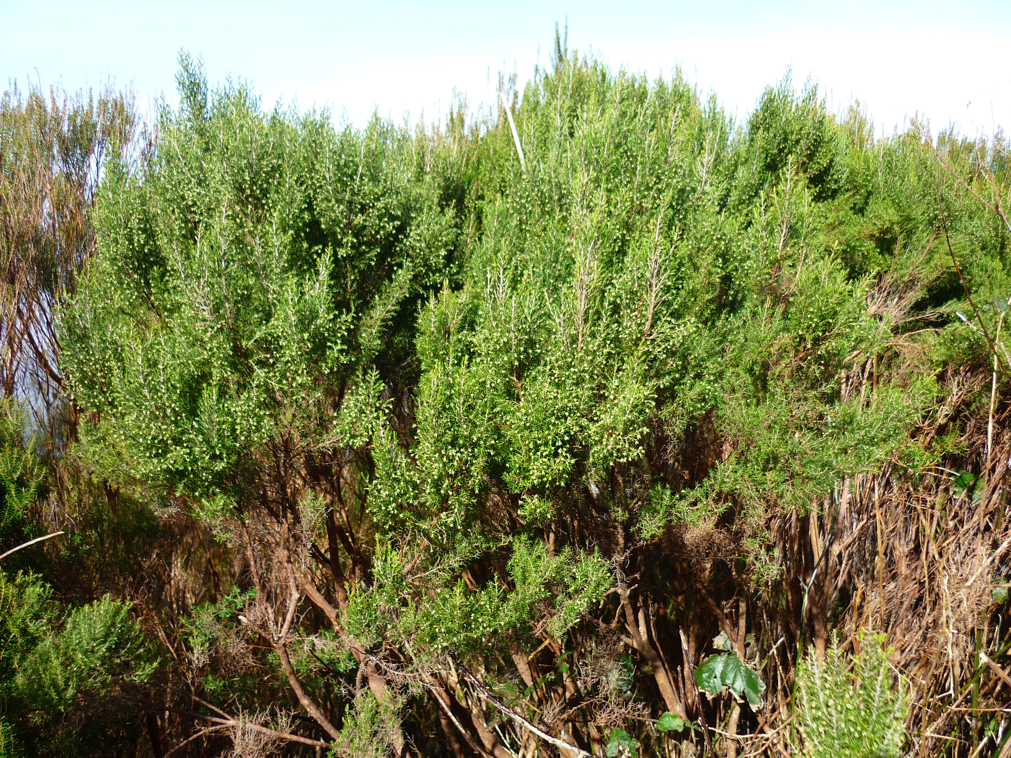 Cserjés hanga (Erica arborea) (Madeira, a Ribeira da Janela völgyének felső szakaszán)